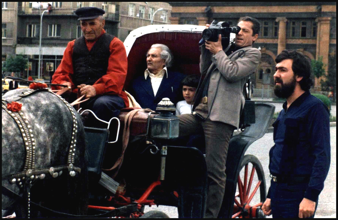 Shiraz filmi nkarahanum Gyumri 1983